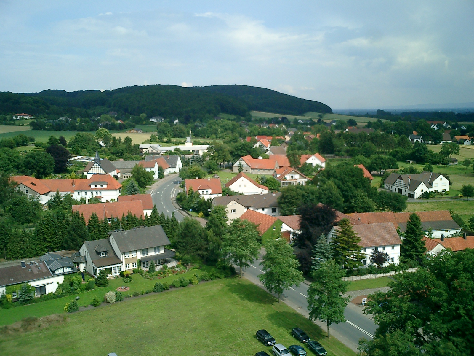 Haldem in nordöstlicher Richtung von oben